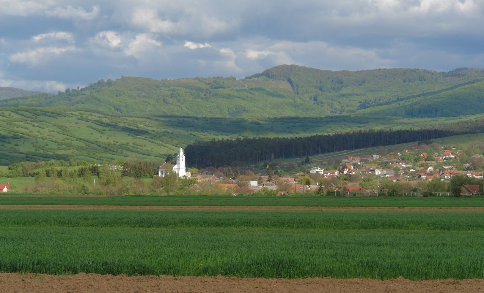 Pürkerec és a Bodzafordulói hegyek